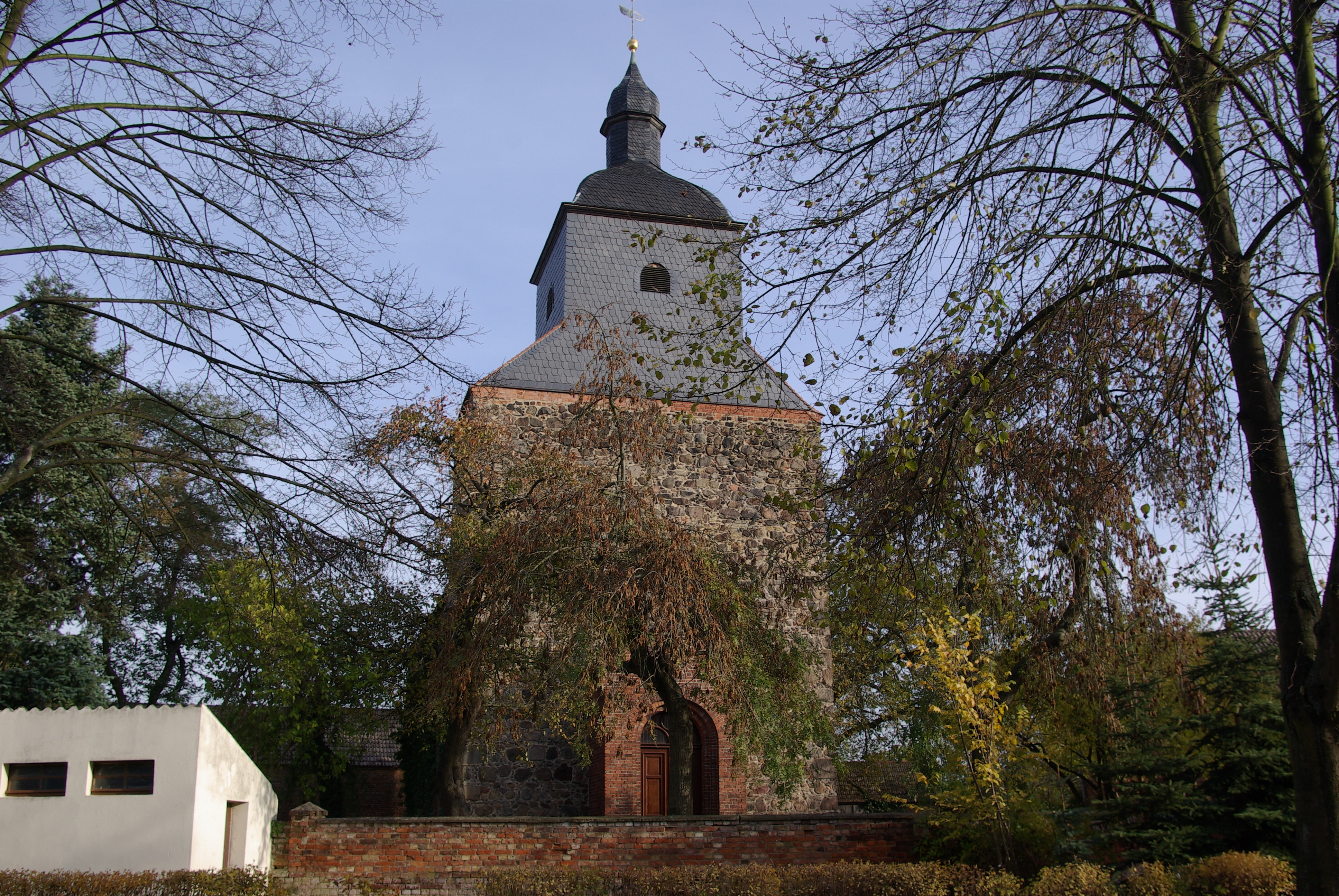 Niedergörsdorf in Brandenburg. Die Kirche im Ortsteil Rohrbeck steht unter Denkmalschutz.